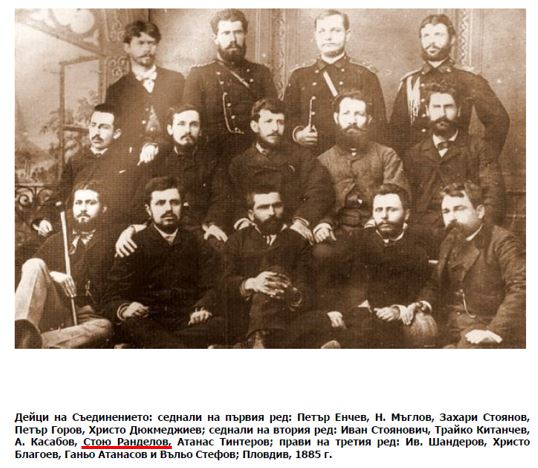 Дейци на Съединението